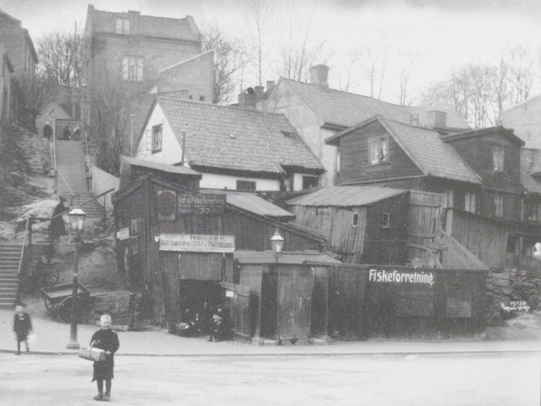 Bergfjerdingen, med "den kommunale trapp" til venstre.